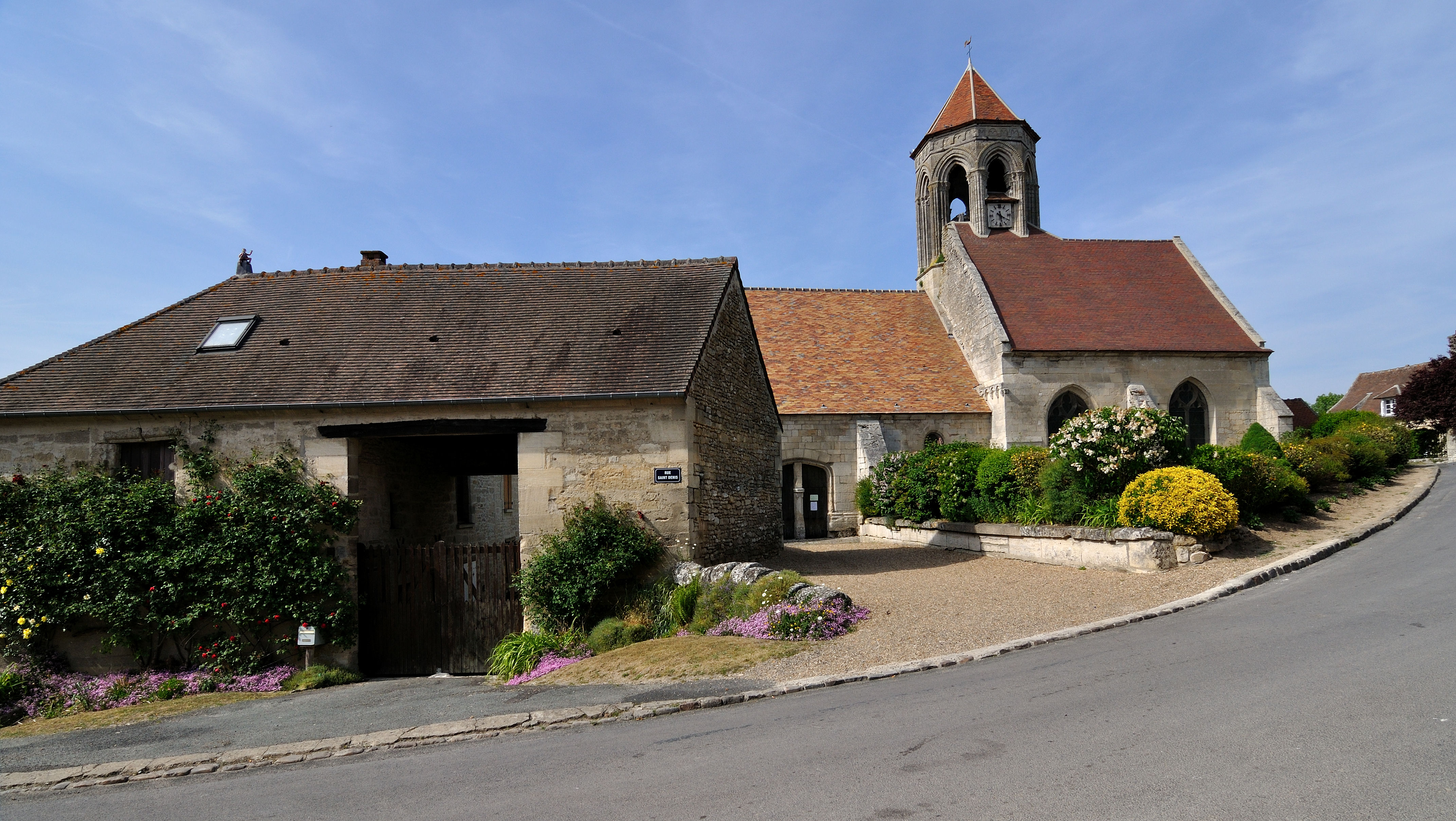 Vue du village de Foulangues (département de l'Oise) Photo prise Nikon D90 et objectif Tokina 12-24mm